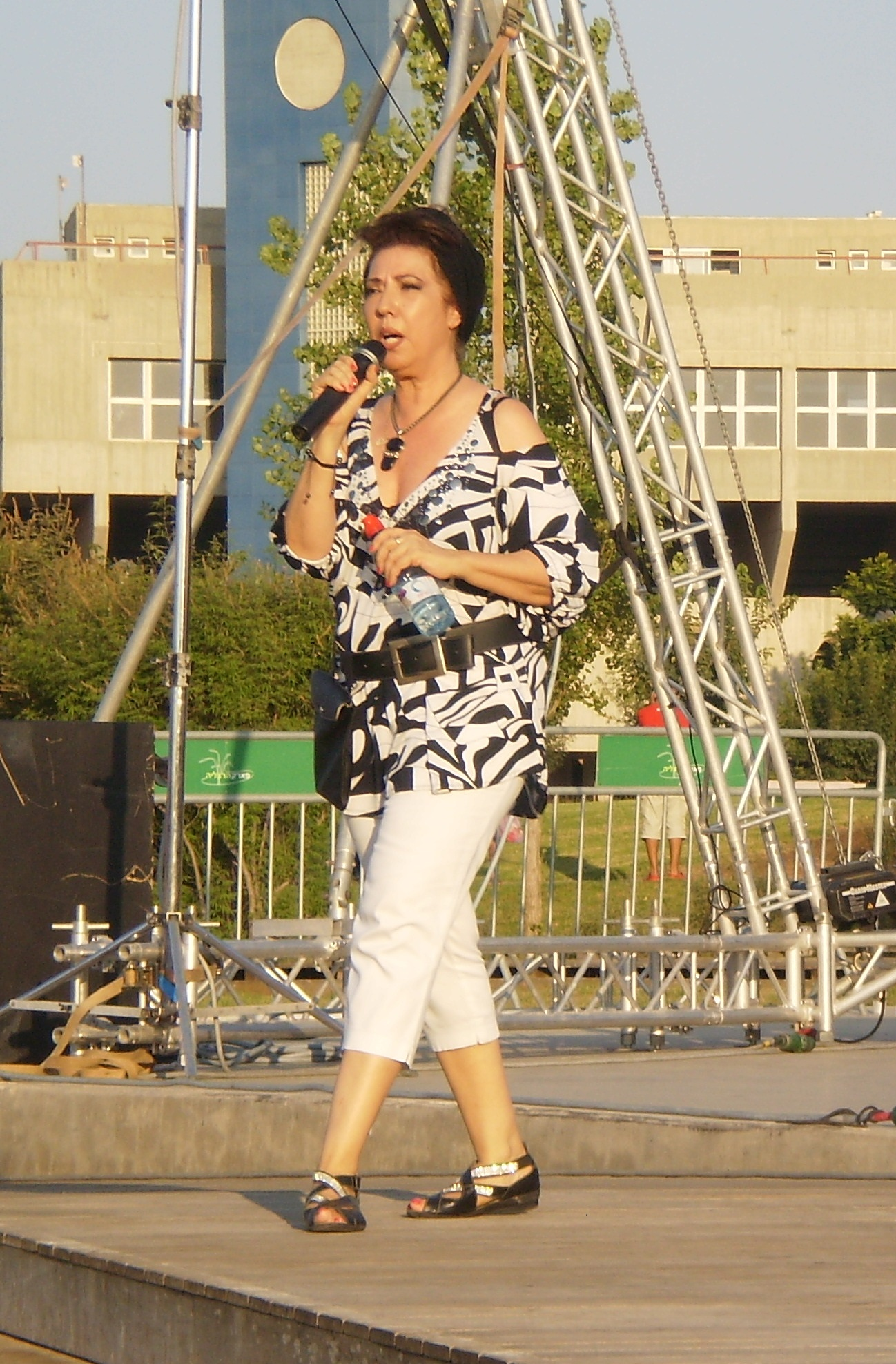 טילדה רג'ואן, יולי 2012